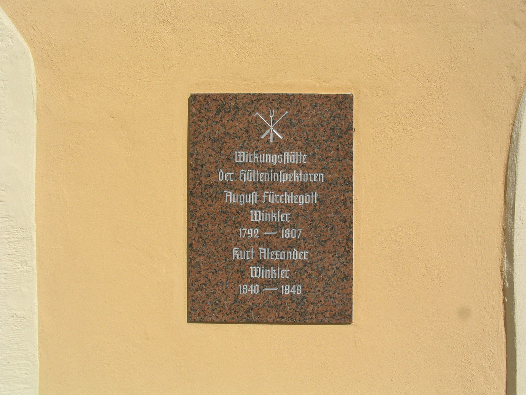 Gedenktafel für August Fürchtegott und Kurt Alexander Winkler am Turmhaus des Blaufarbenwerkes Zschopenthal, Aufgenommen am 15.04.2006 von Dr. Hagen Graebner